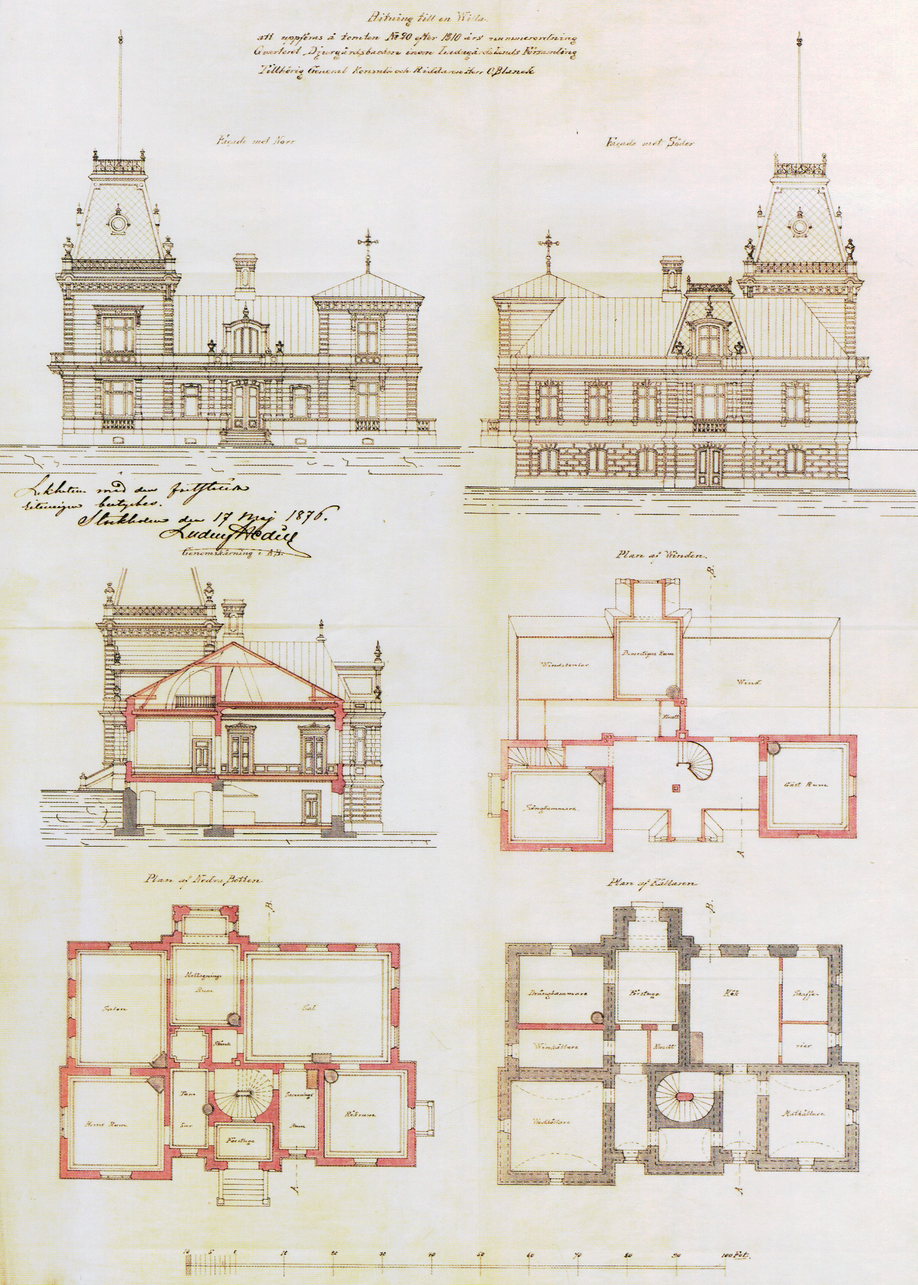 Wallenbergska villan, arkitektritning